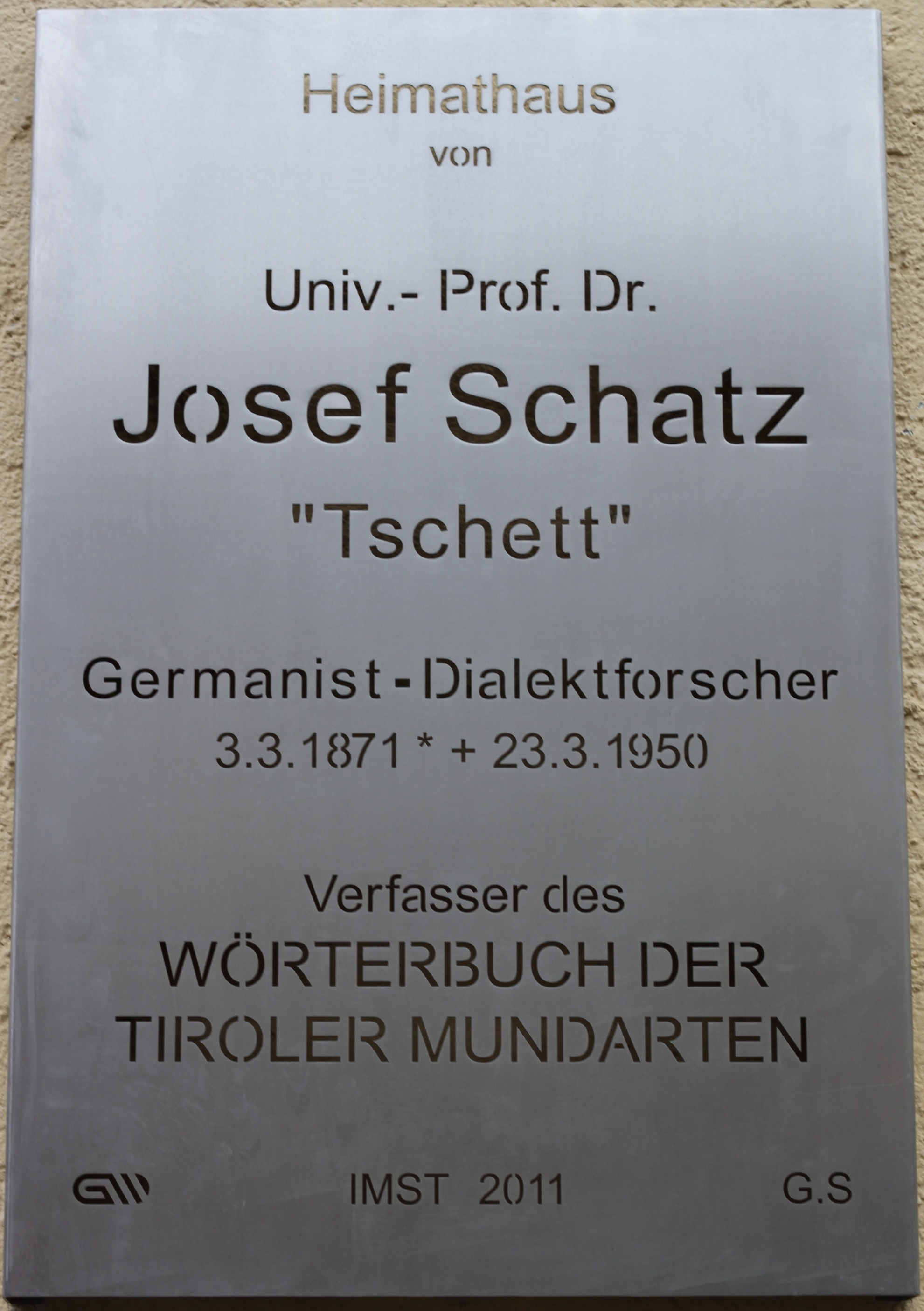 Schatz Josef Gedenktafel in Imst bei der Feuergallerie Tschett